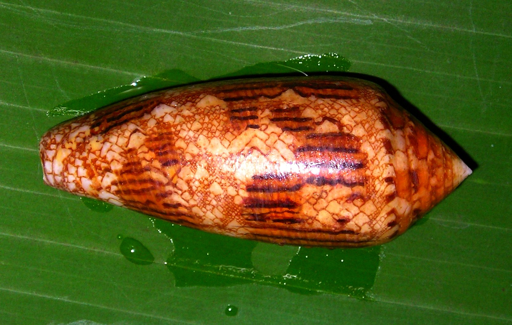 Conus aureus Hwass in Bruguière, 1792